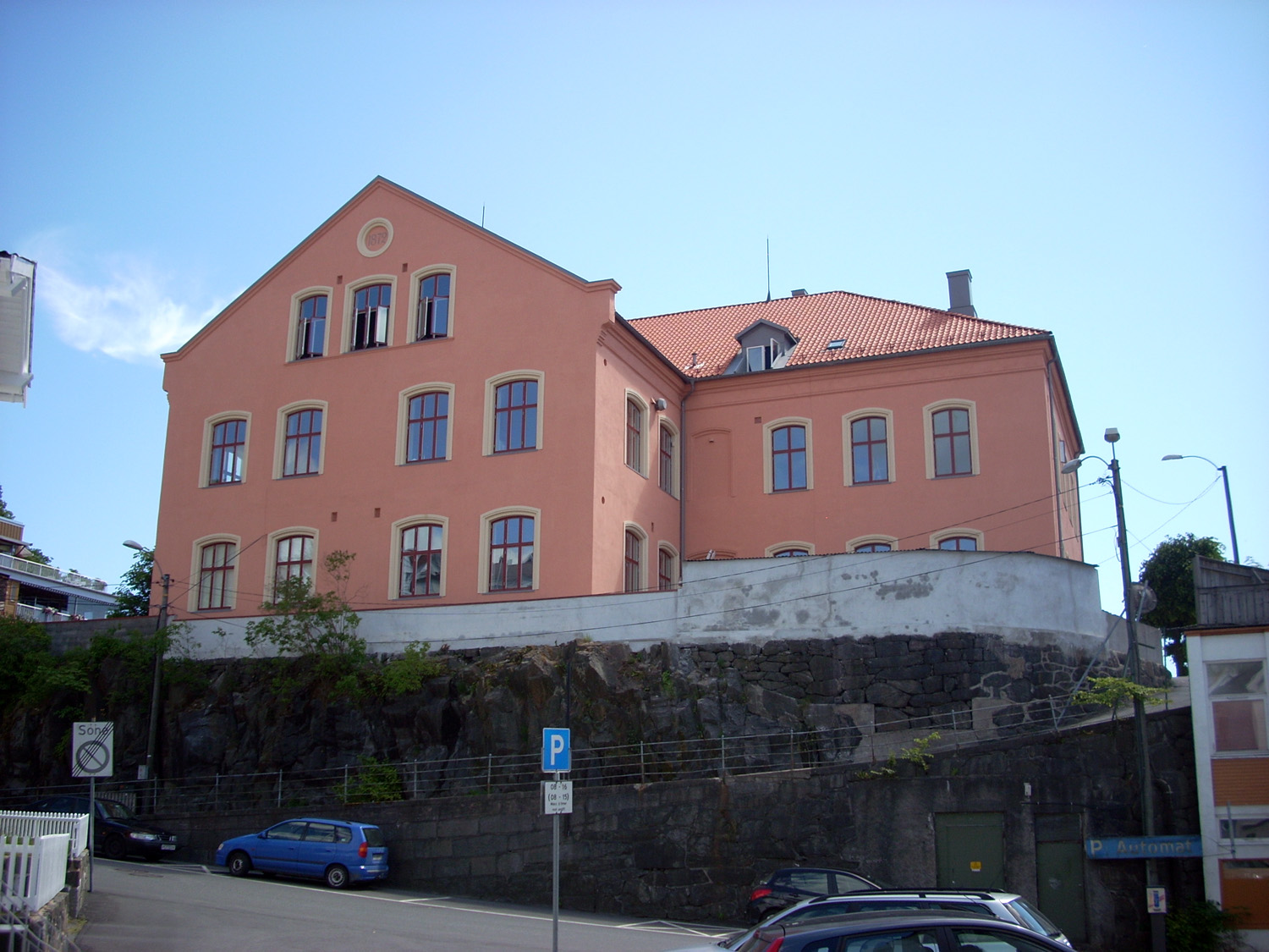 Munkehaugen Kultursenter i Arendal